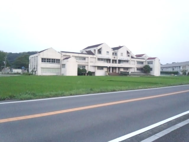 正面より撮影